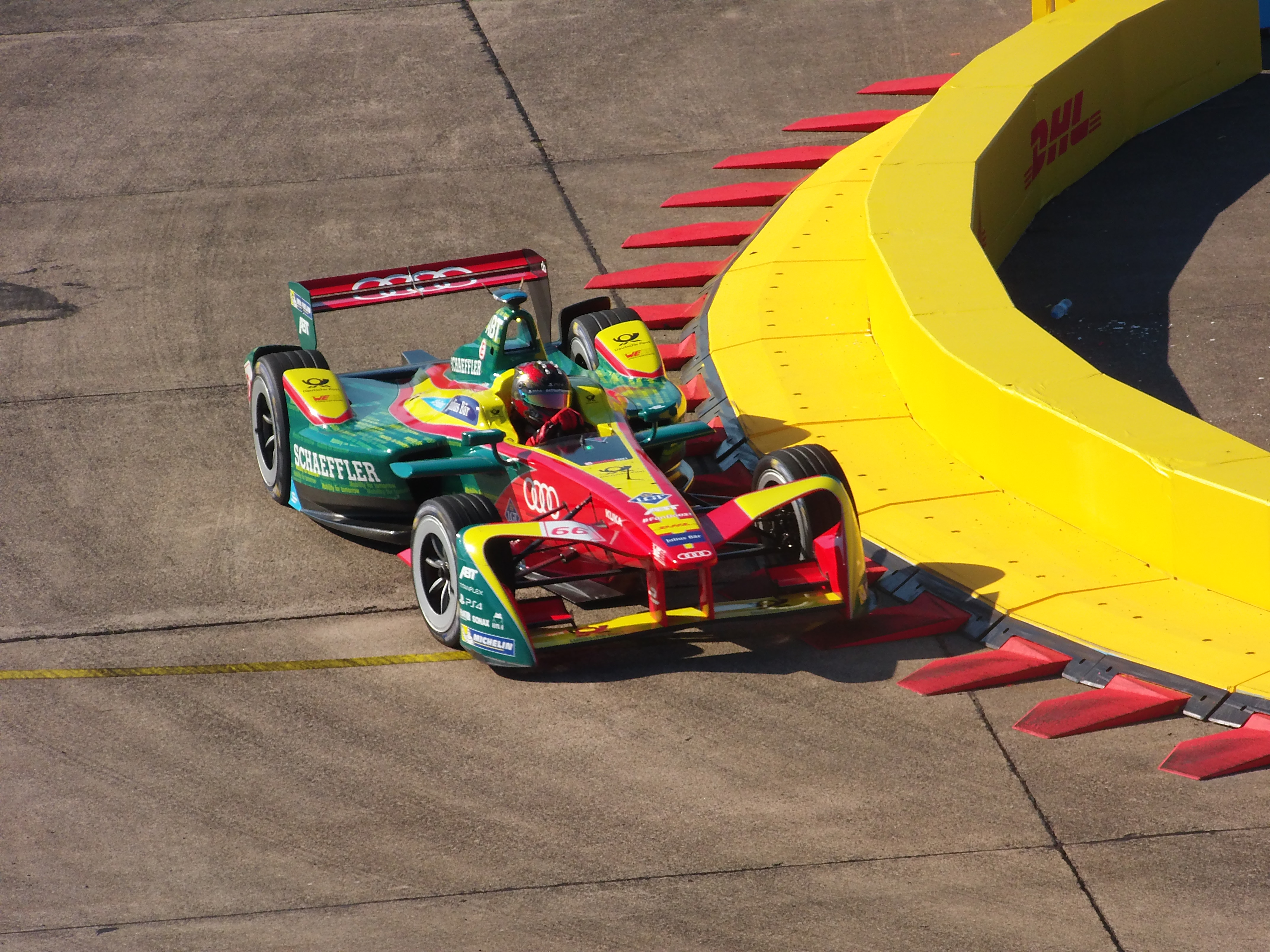 Daniel Abt (ABT Schaeffler Audi Sport) beim Berlin ePrix 2017